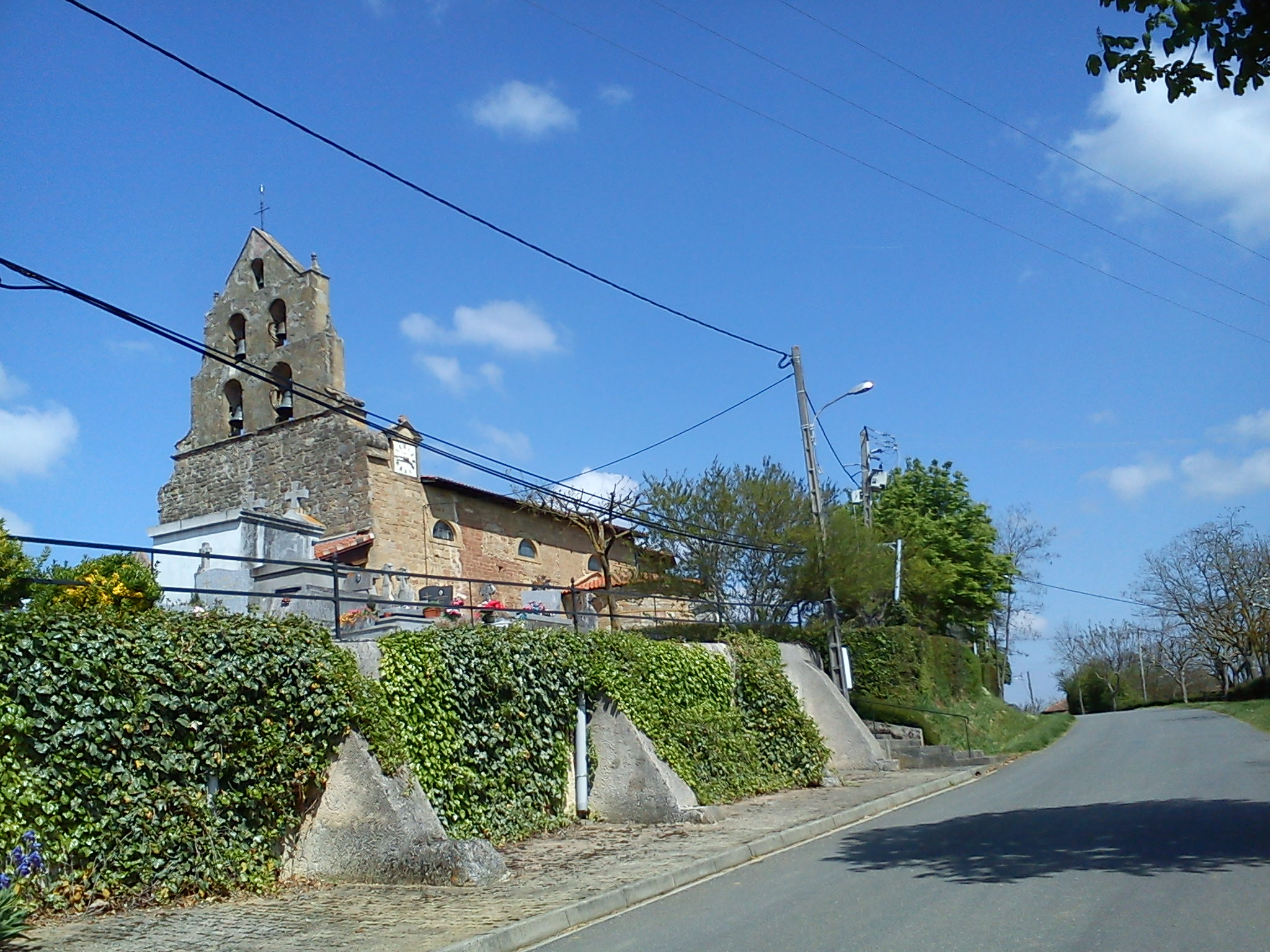 Église de Lussan-Adeilhac